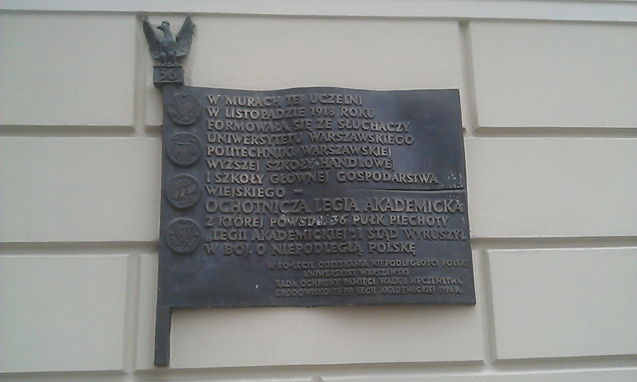 Tablica poświęcona 36. Pułkowi Piechoty Legii Akademickiej, umieszczona na ścianie zewnętrznej Collegium Iuridicum I.